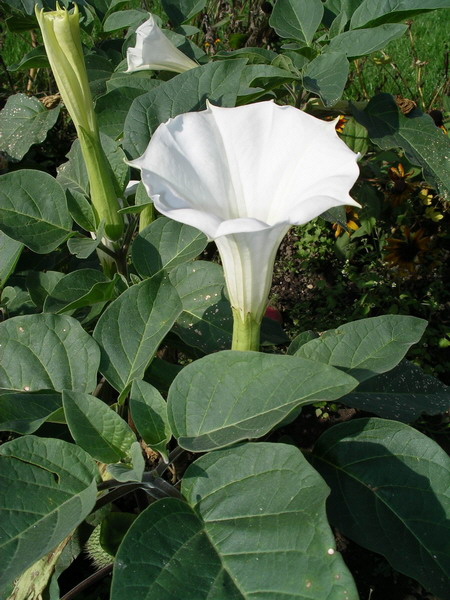 Durnaropė